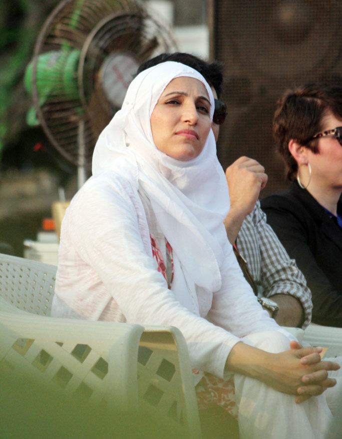 സൽമാ യാഖൂബ്